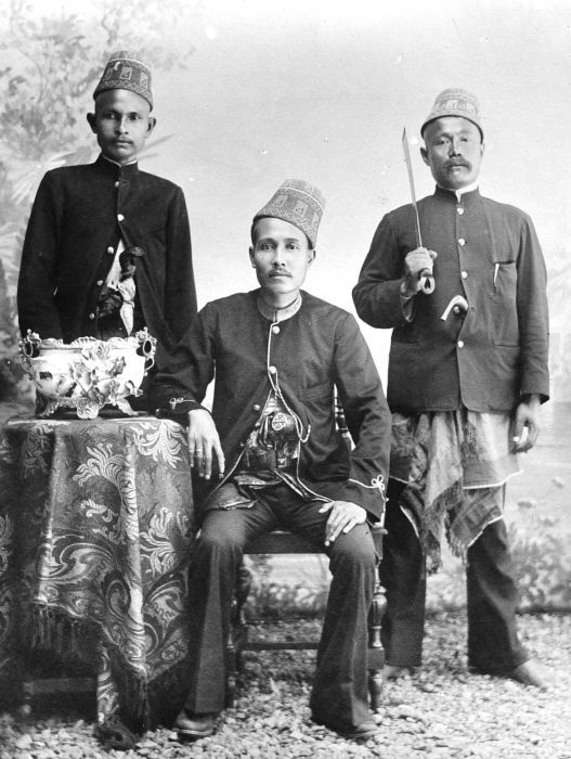 Repronegatief. Portret van de pretendent Sultan van Atjeh met volgelingen